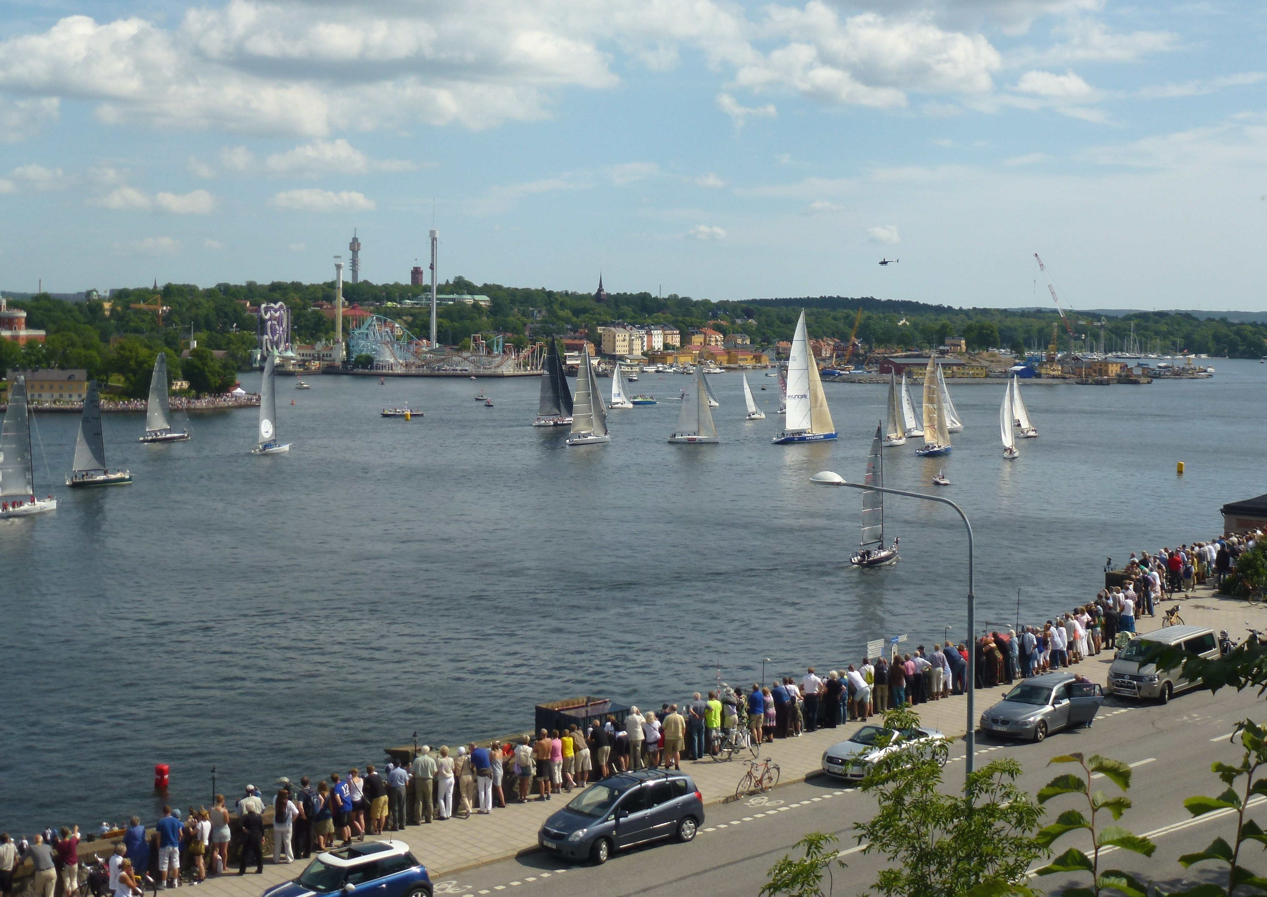 Gotland Runt 2012-07-01 start i Stockholm